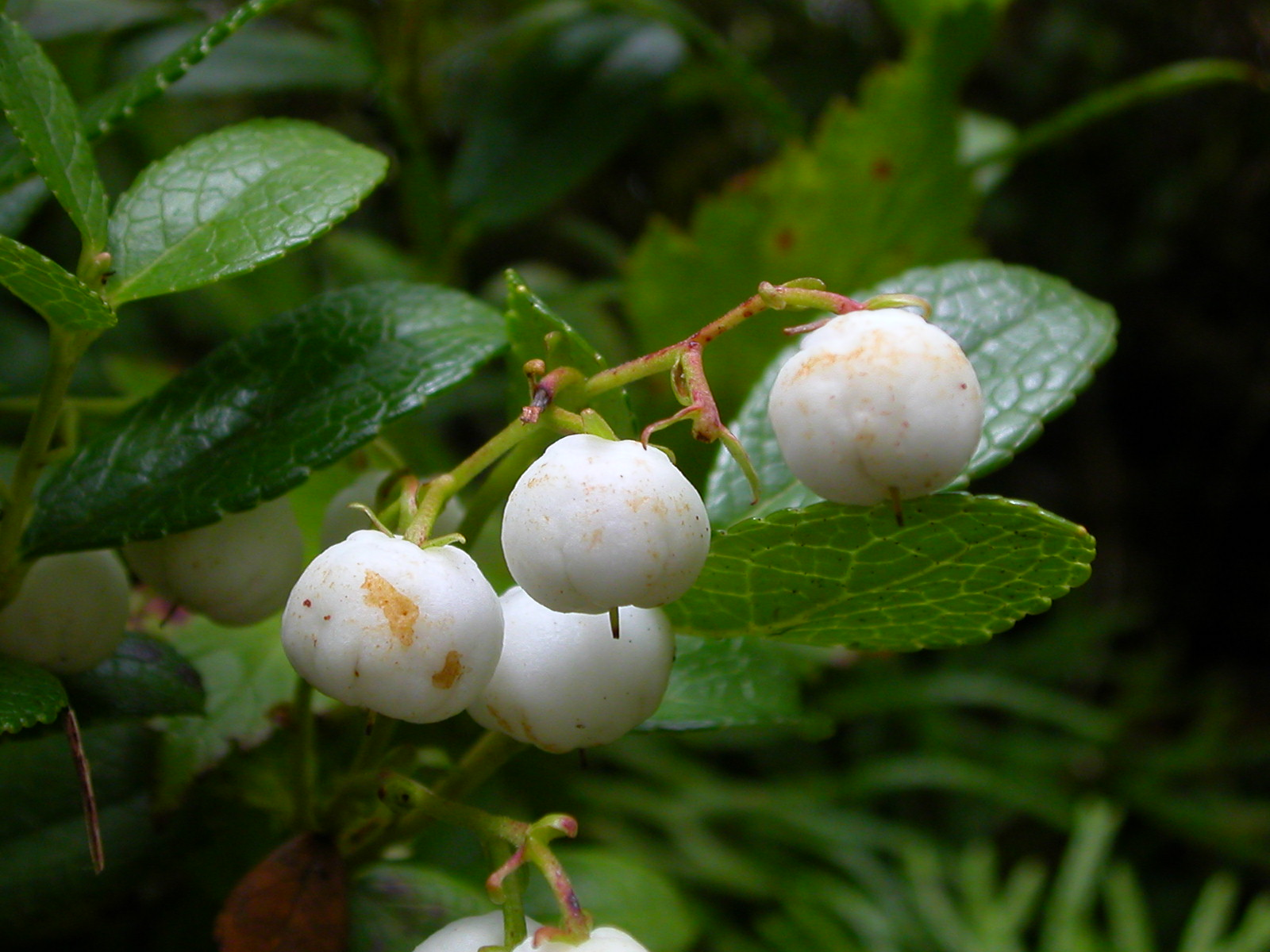 雄国沼のシラタマノキ(Gaultheria miqueliana at oguni-numa Fukushima, Japan)